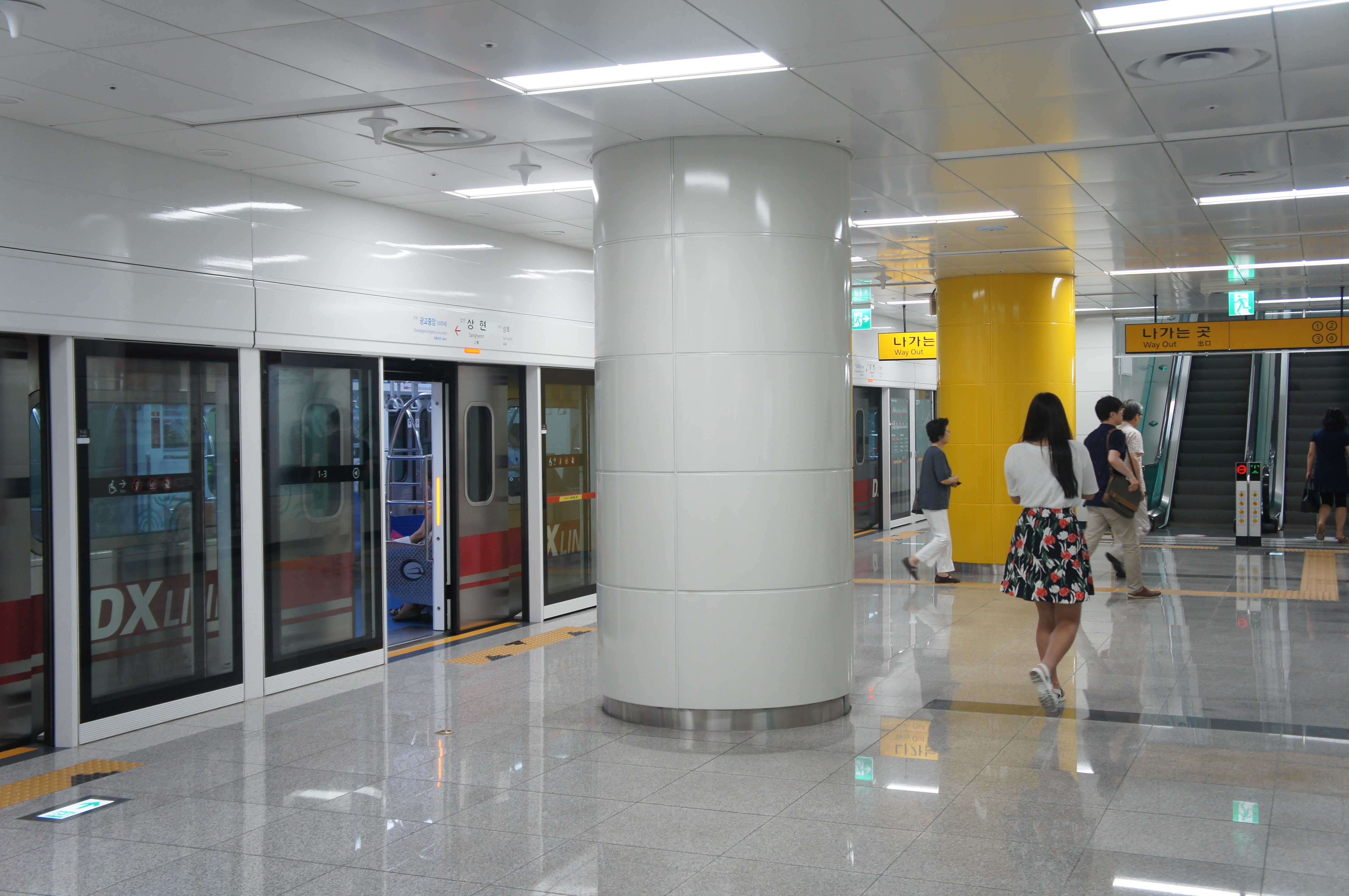 상현역 승강장